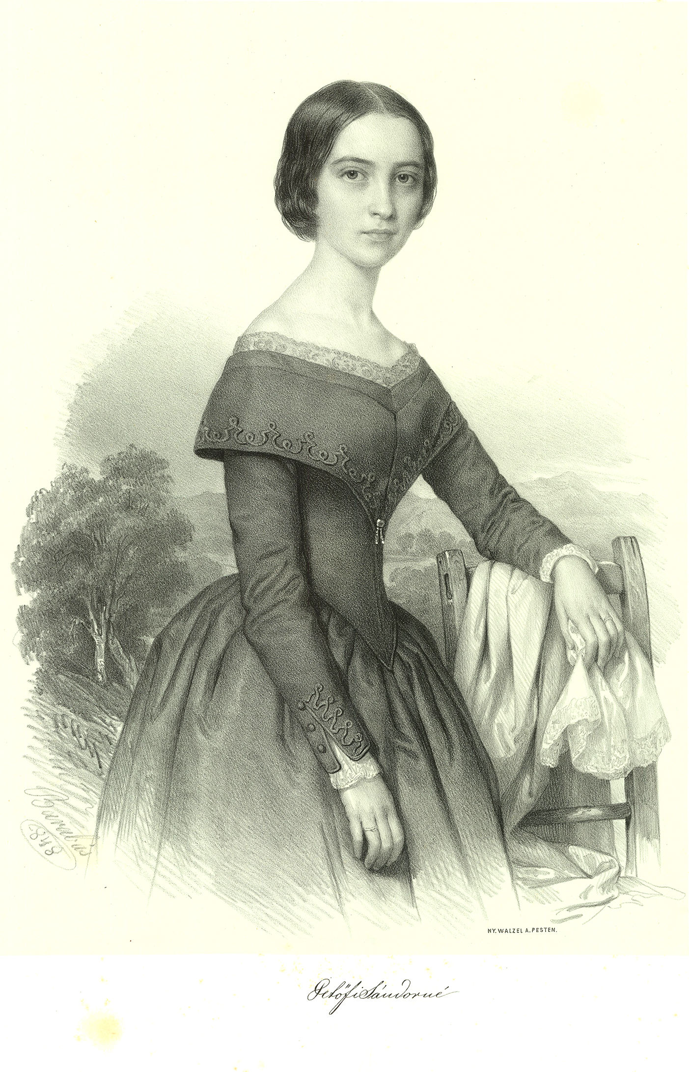 Petőfi Sándorné Szendrey Júlia (Keszthely, 1828. december 29. – Pest, 1868. szeptember 6.) költő, író; előbb Petőfi Sándor, majd Horvát Árpád történész felesége.